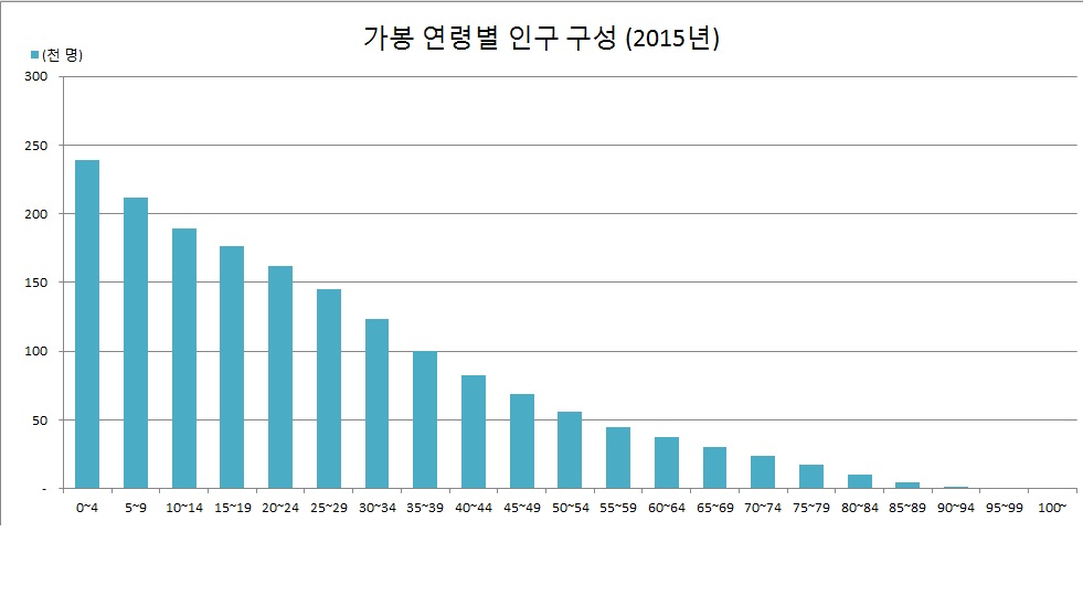 한국어 (조선): 가봉 연령별 인구 구조